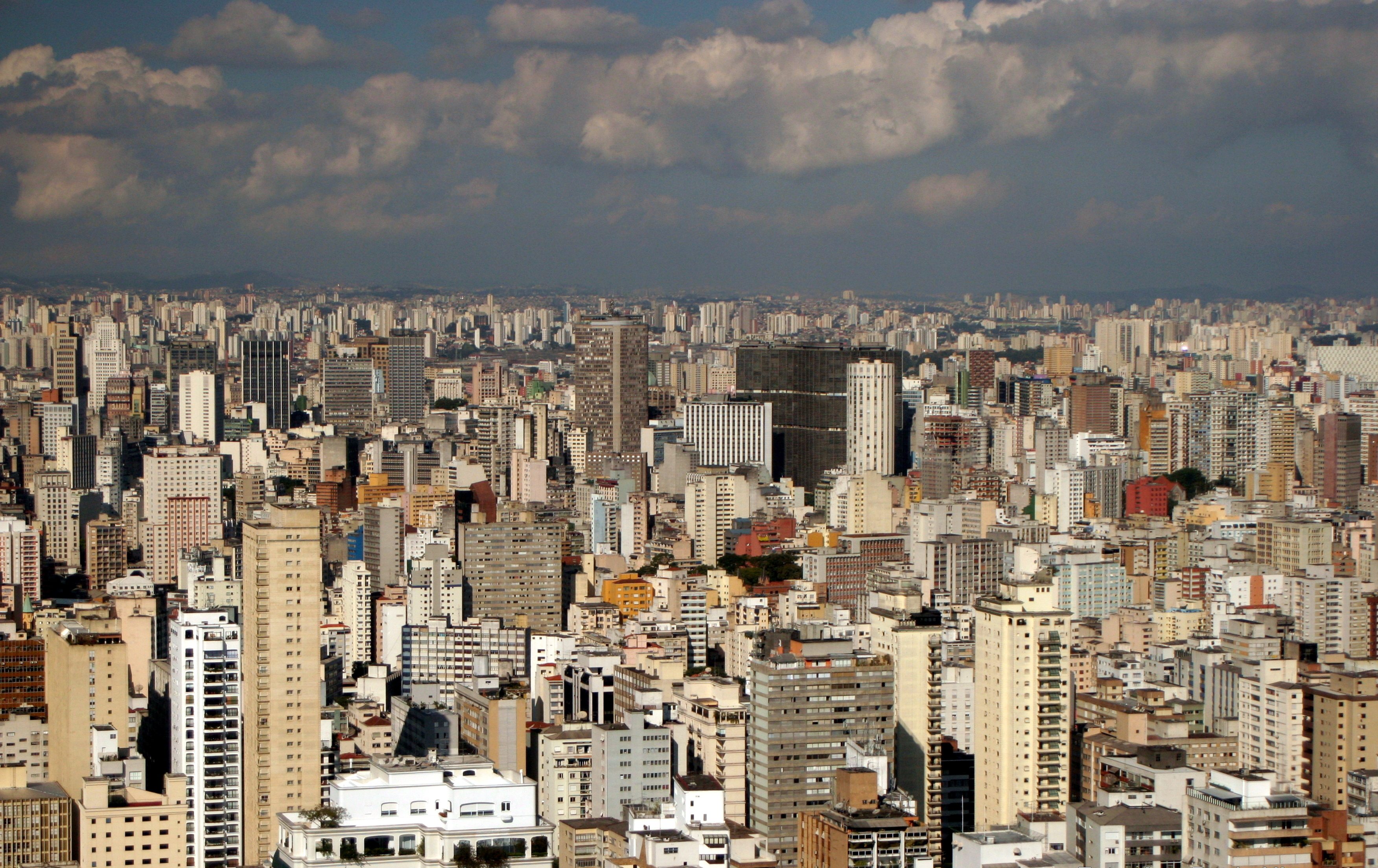 Vista do centro de São Paulo, Brasil.